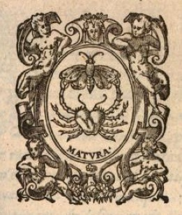 Motif du crabe et du papillon, avec la devise MATVRA. Marque d'imprimeur-libraire de Paul Frellon, libraire à Lyon (premier quart du XVIIe siècle).